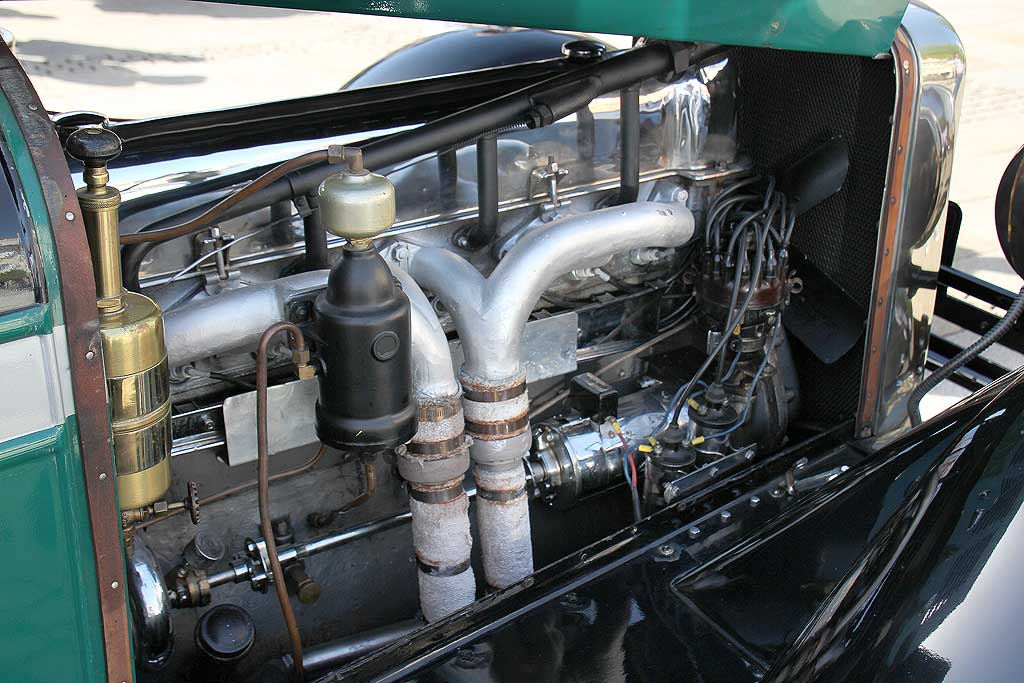 1926 Stutz Sedan_IMG_4141